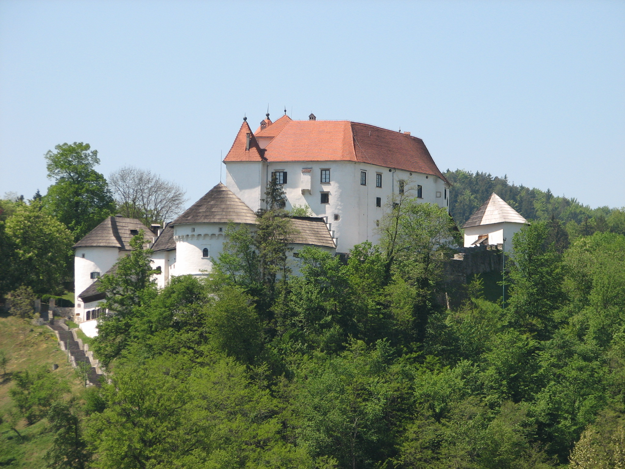 Castle of Velenje